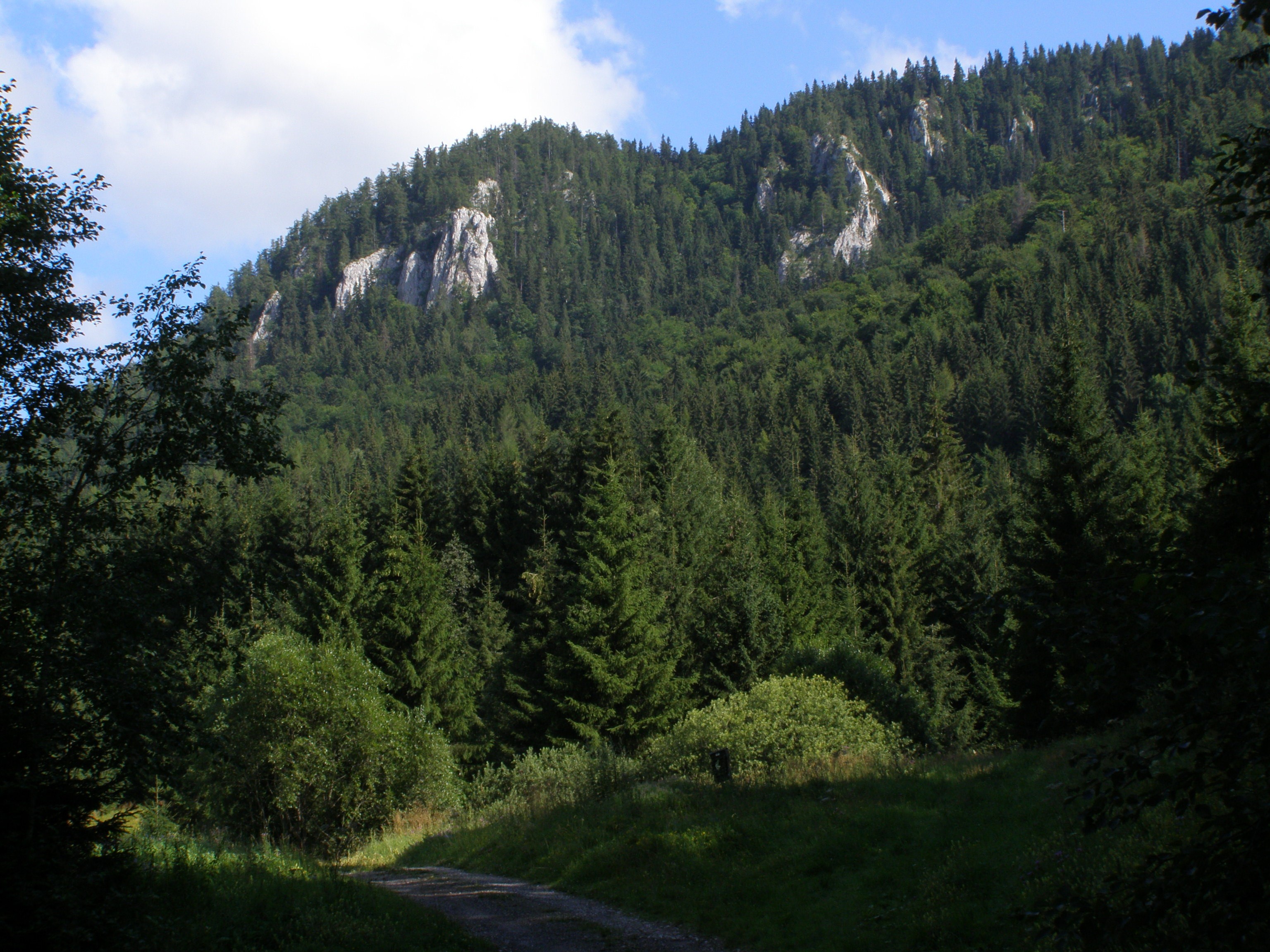 Slovenské rudohoří, Spišsko-gemerský kras, Muráňská planina, skály vrcholu Veľká Stožka (1297 m), pohled od jihu